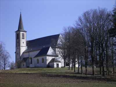 Photograph: FJE (selbst fotografiert)